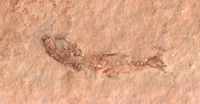 Leptolepides (certainly Leptolepides sprattiformis)